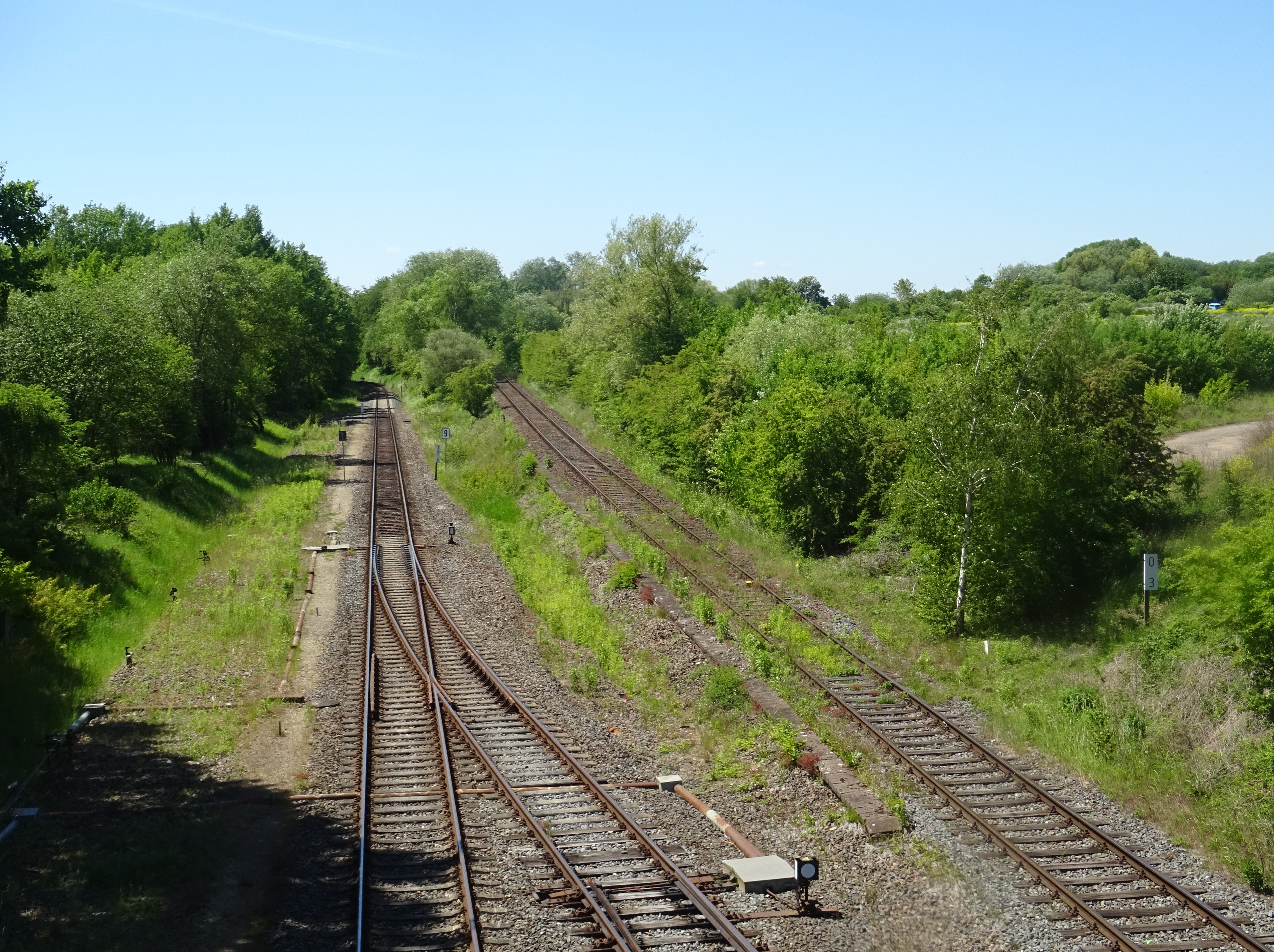 Bahnhof Hohenebra, Trennung der Strecken nach Erfurt (links) und Ebeleben (rechts)